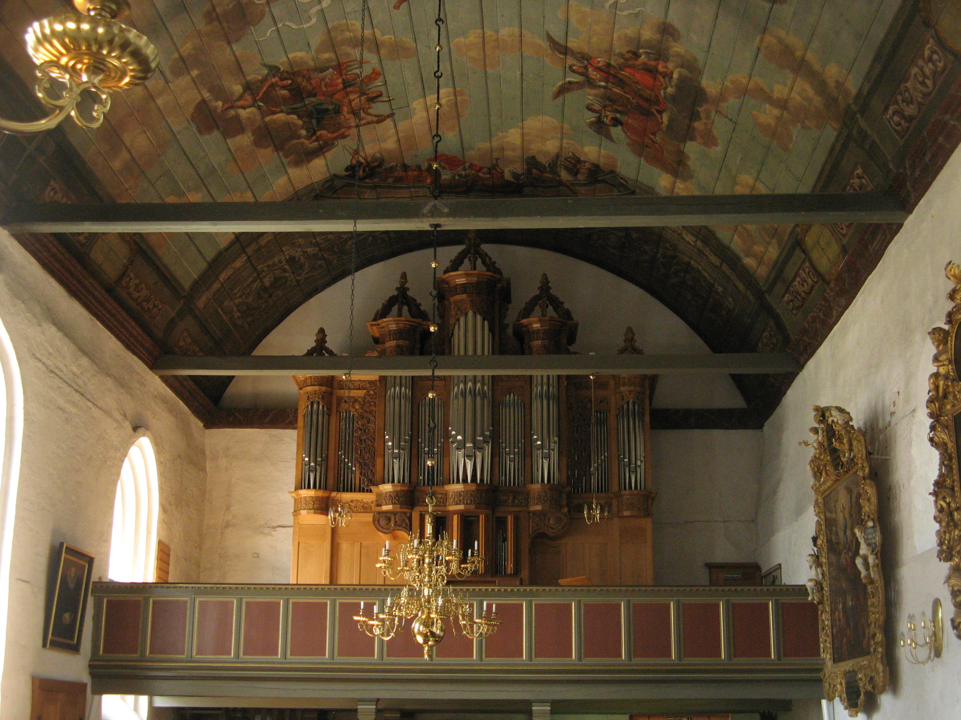 sankt laurentius church in tönning